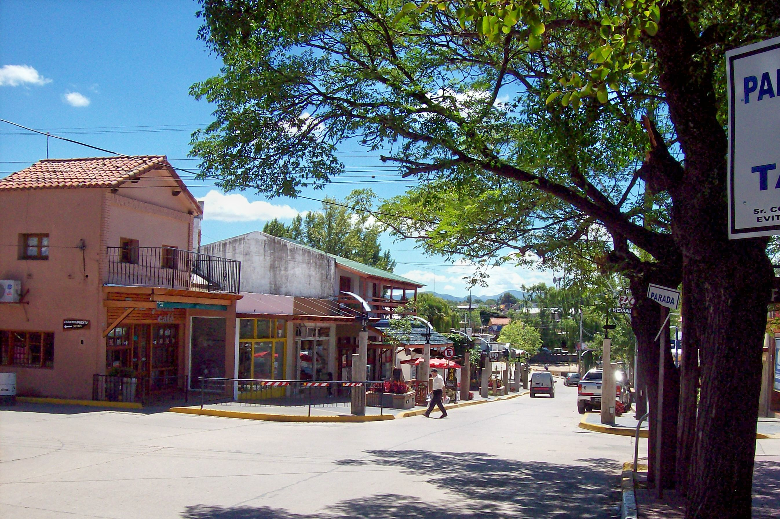 Avenida San Martín y Anastasia F. de Merlo, en Mina Clavero, provincia de Córdoba, Argentina.